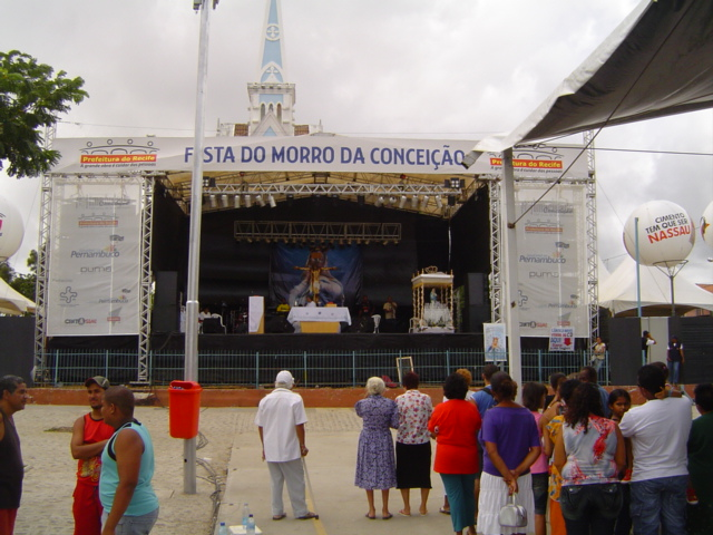 Foto do palanque onde se realizam missas contínuas para festejas a Nossa Senhora da Conceição, no Morro da Conceição